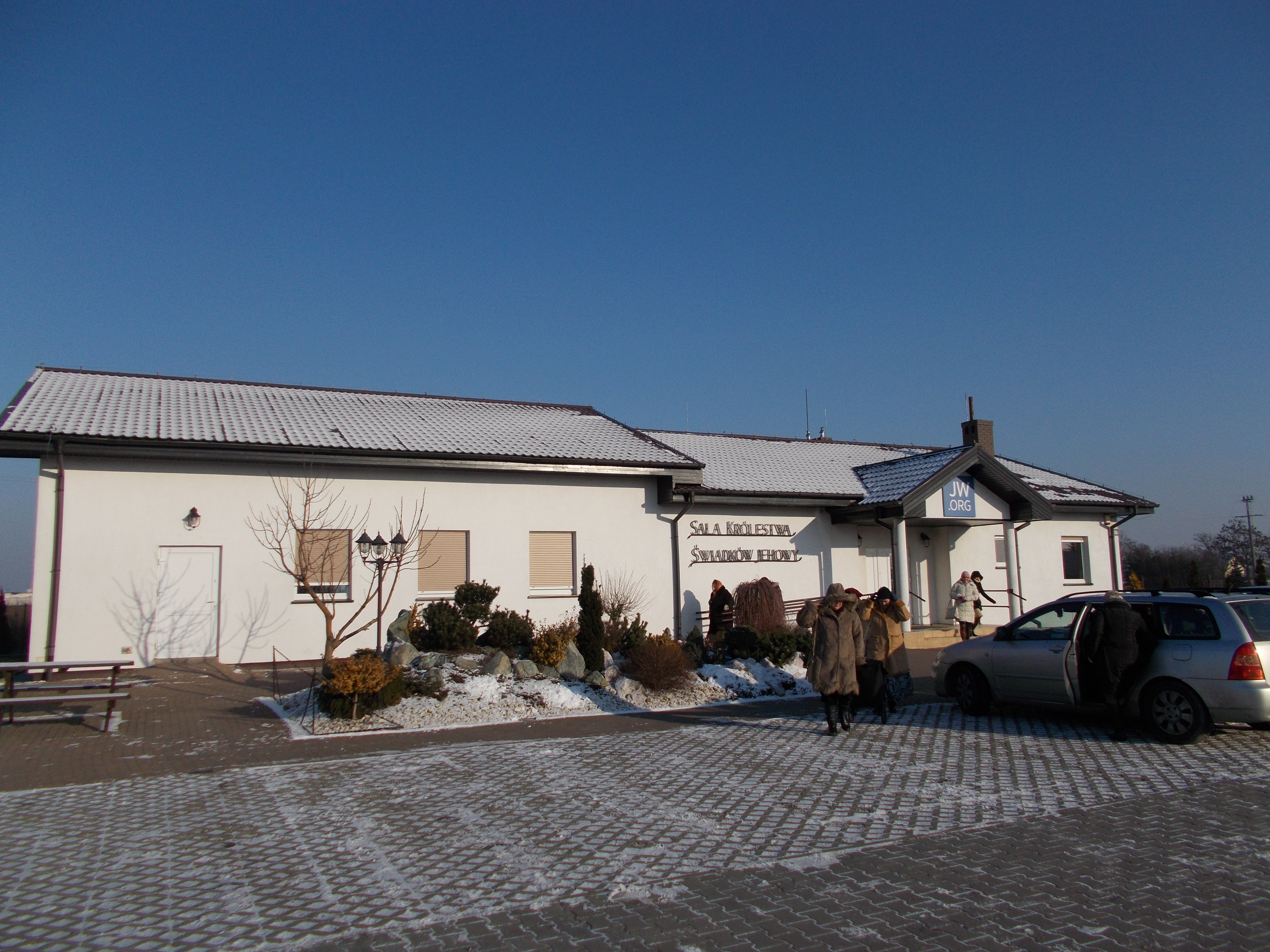 Sala Królestwa Świadków Jehowy w Poznaniu na Szczepankowie na ulicy Tarnowskiej.